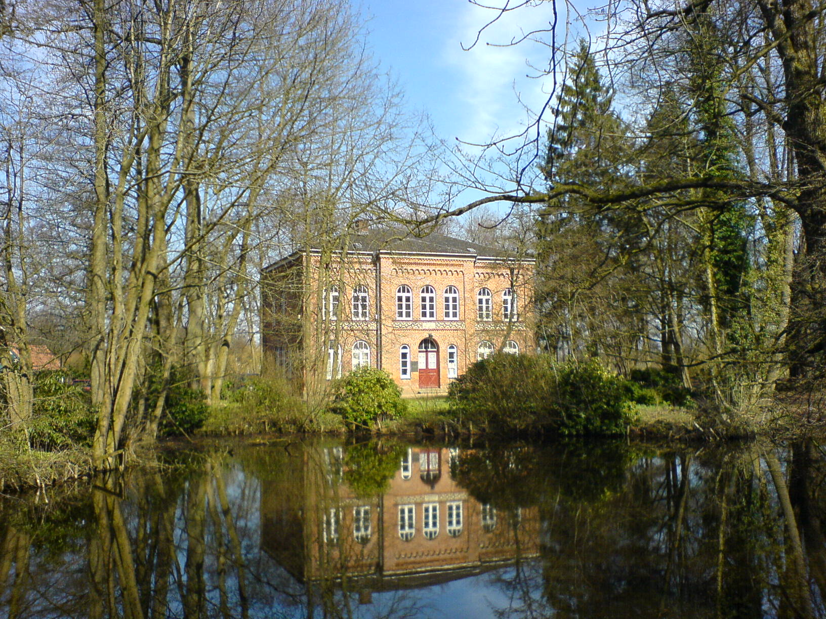 Schlosinsel Barmstedt, Winter